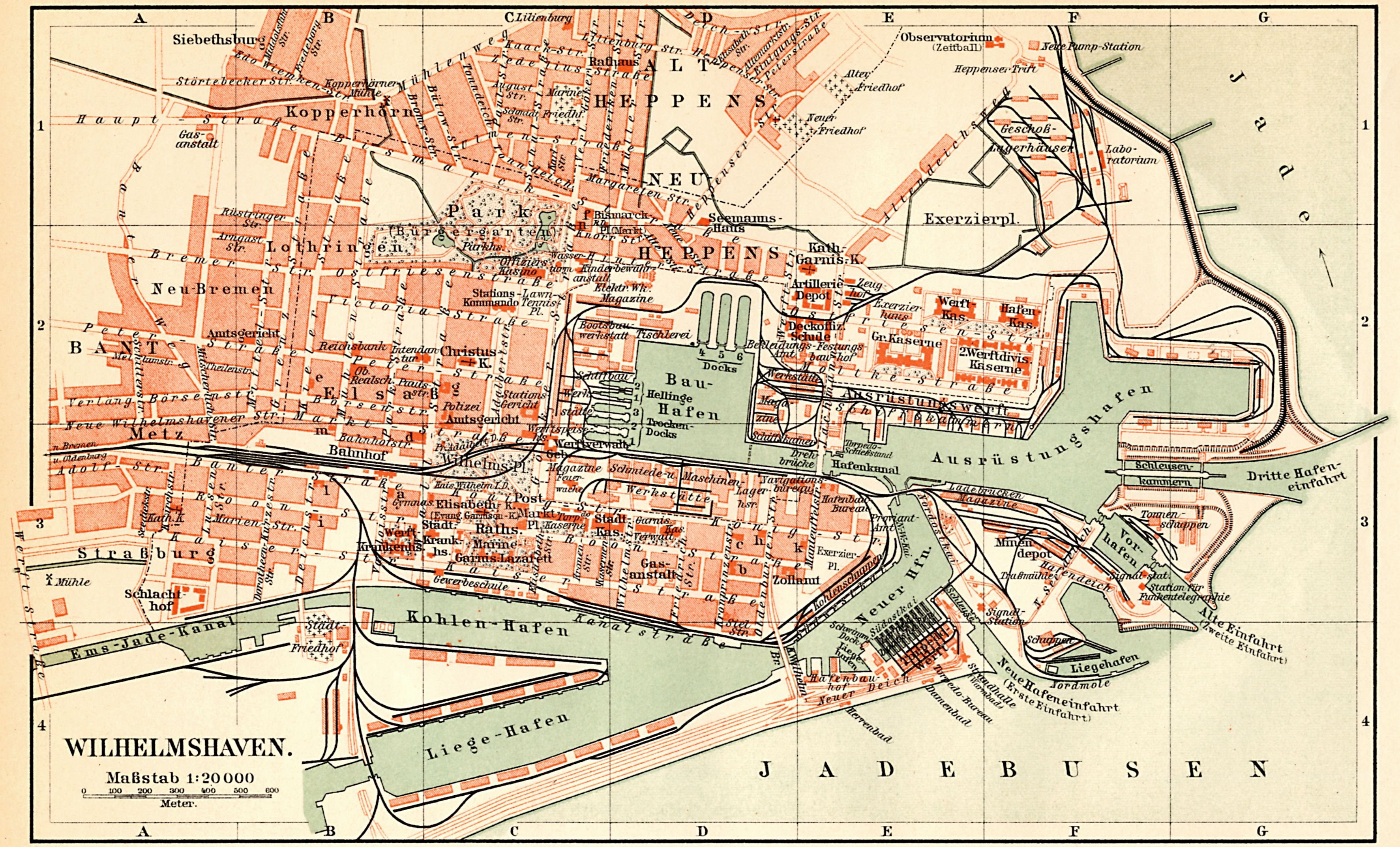 Stadtplan von Wilhelmshaven. Aus: Meyers Großes Konversations-Lexikon 6. Auflage 1905–1909.